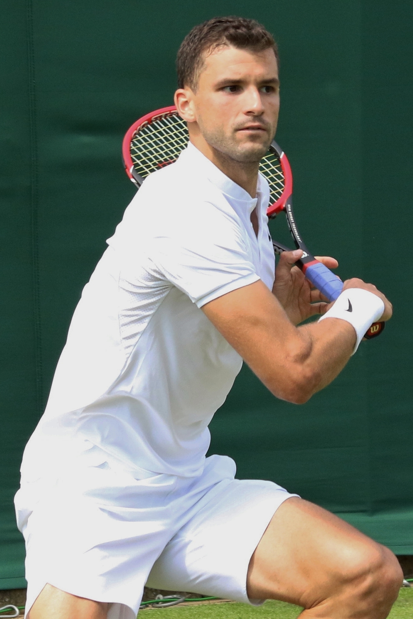 Dimitrov WM16 (67)